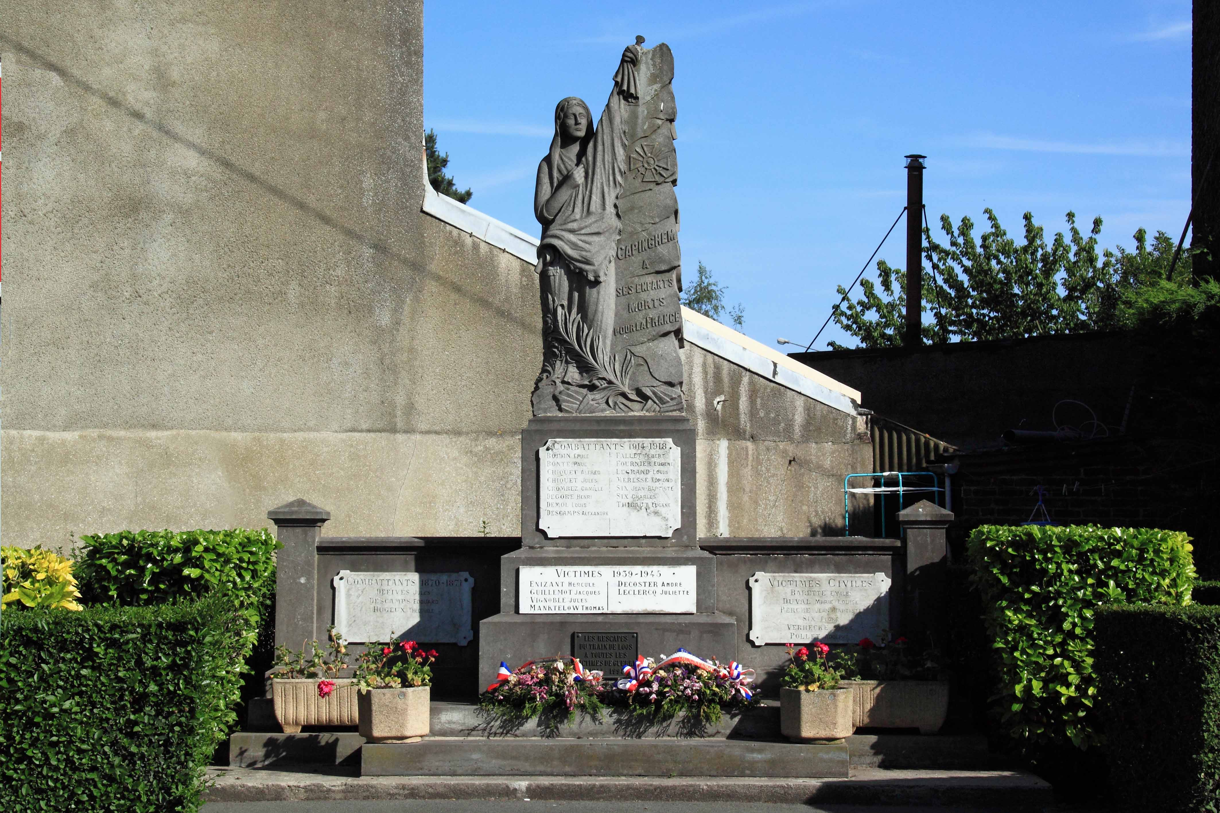 Monument aux Morts - Rue de l'Eglise, 59 Capinghem